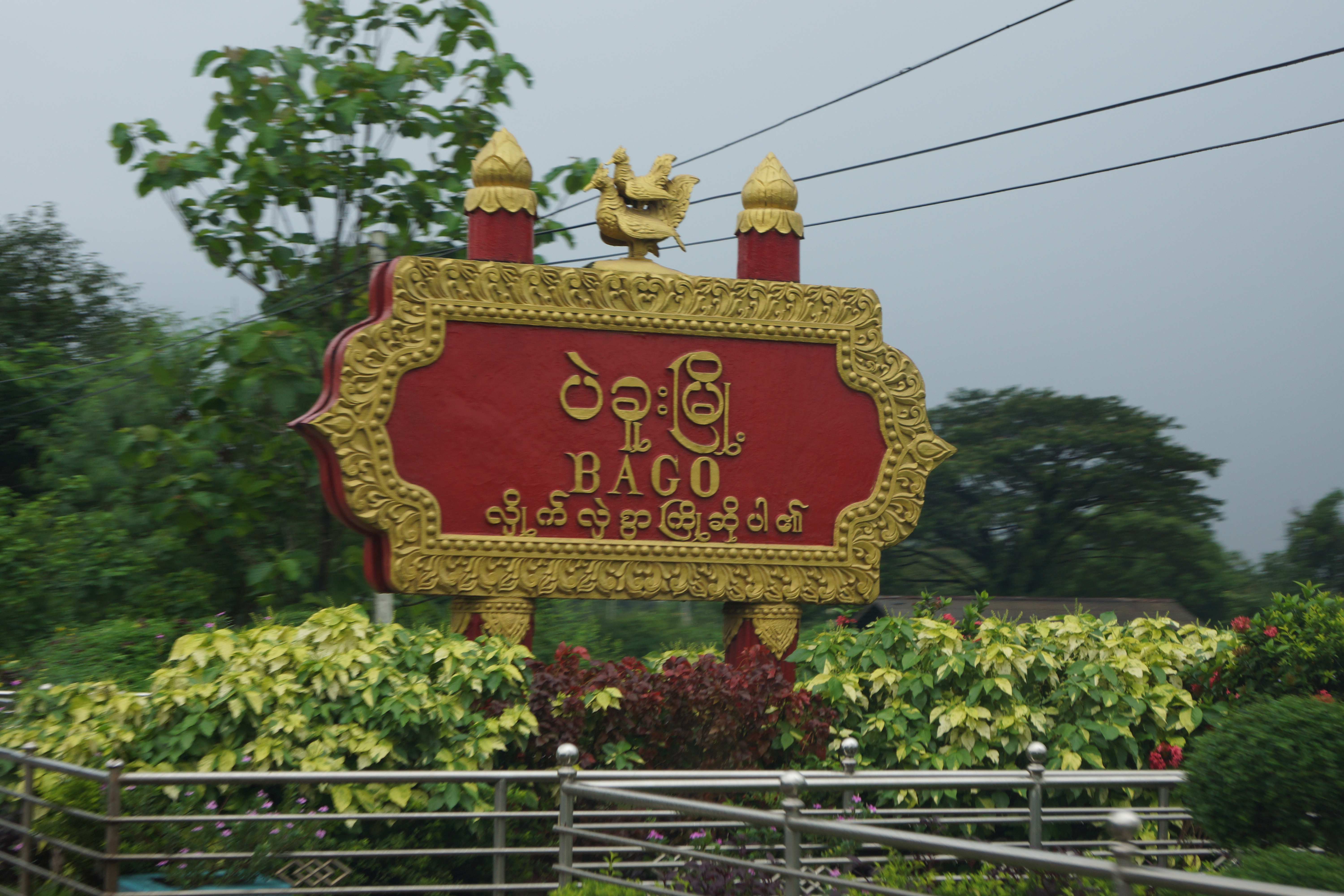 Hongsawetoi